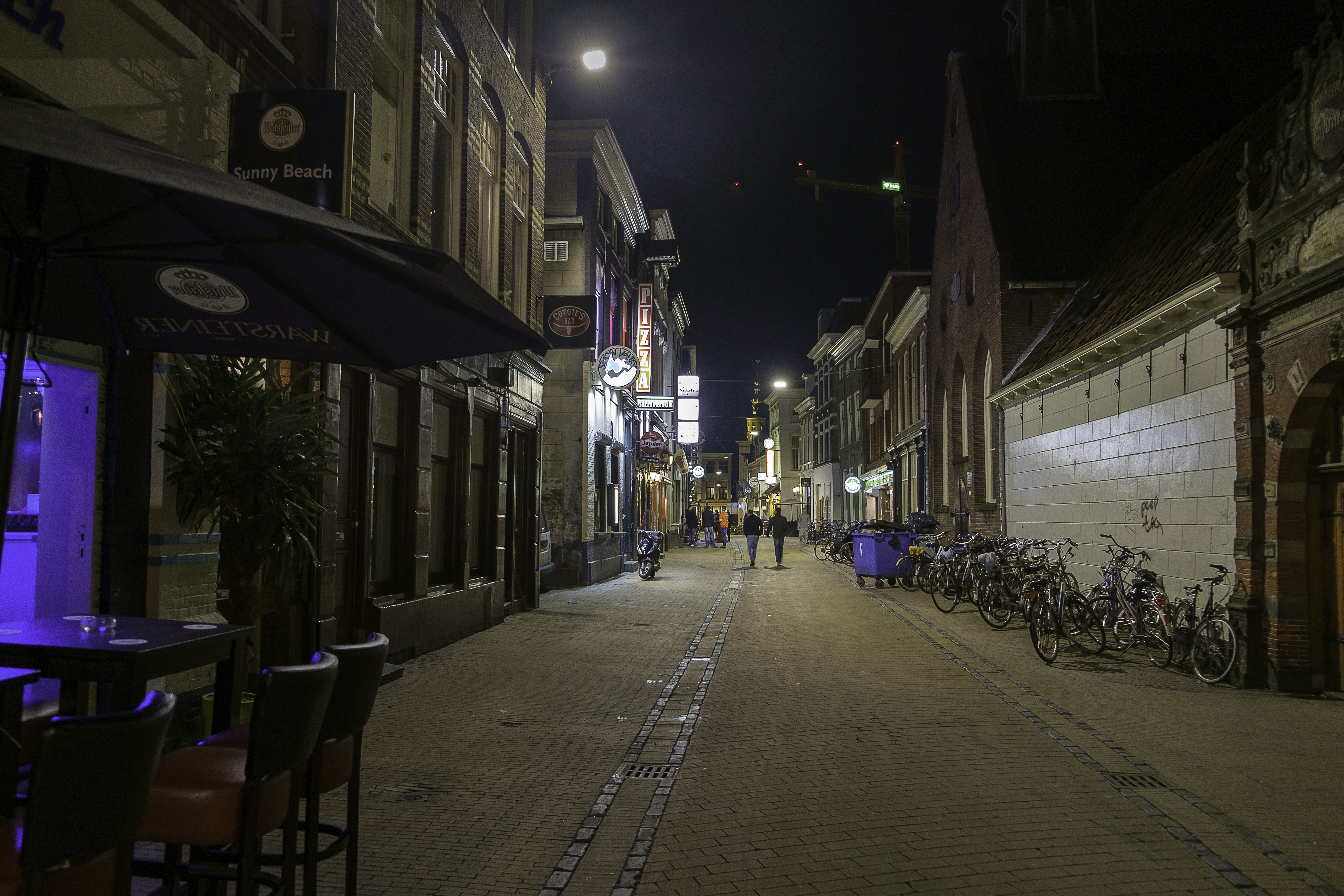 Peperstraat bij avond